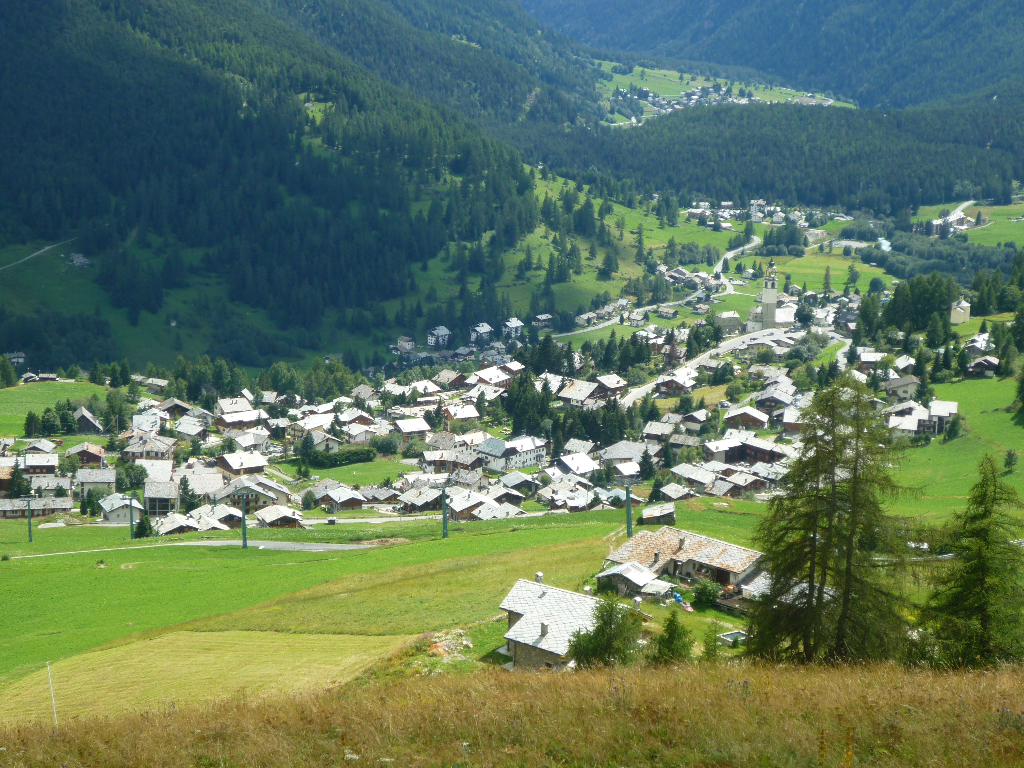 Antagnod - Ayas (Vallée d'Aoste)